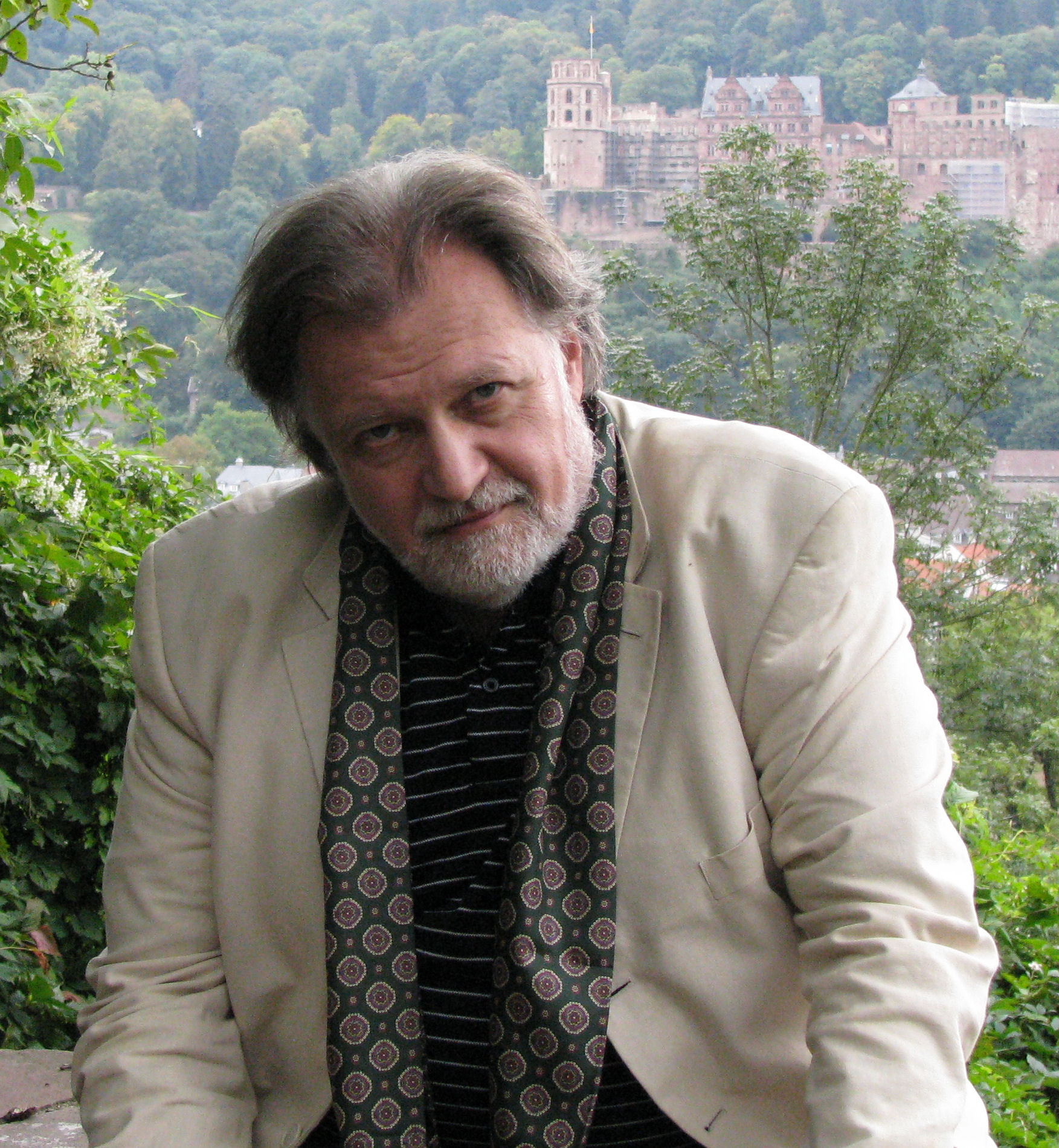 Efim A. Rezvan, Photo: G. Ziethen, 2014